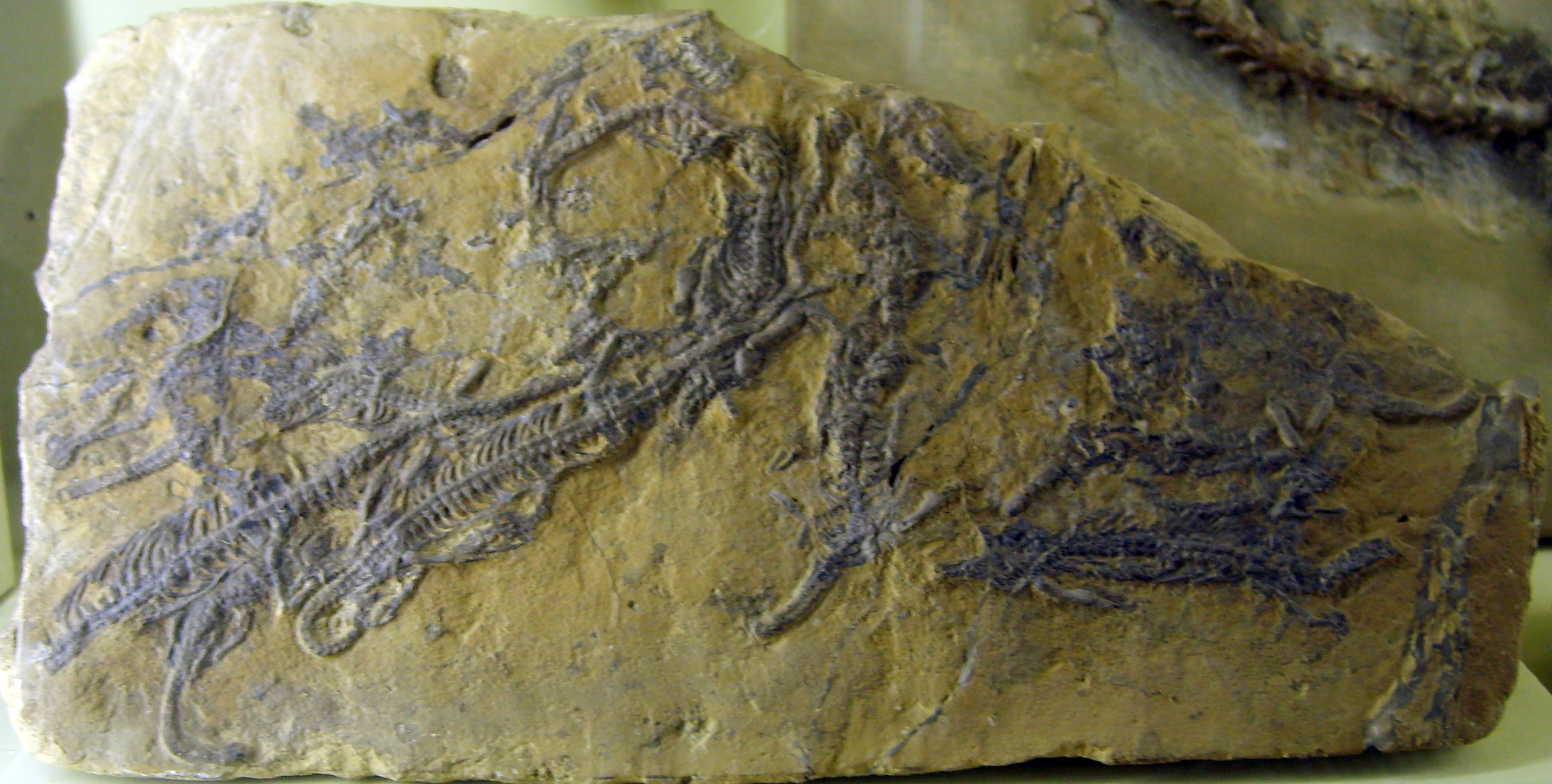 Several Neuticosaurus pusillus at the Museum für Naturkunde, Berlin.